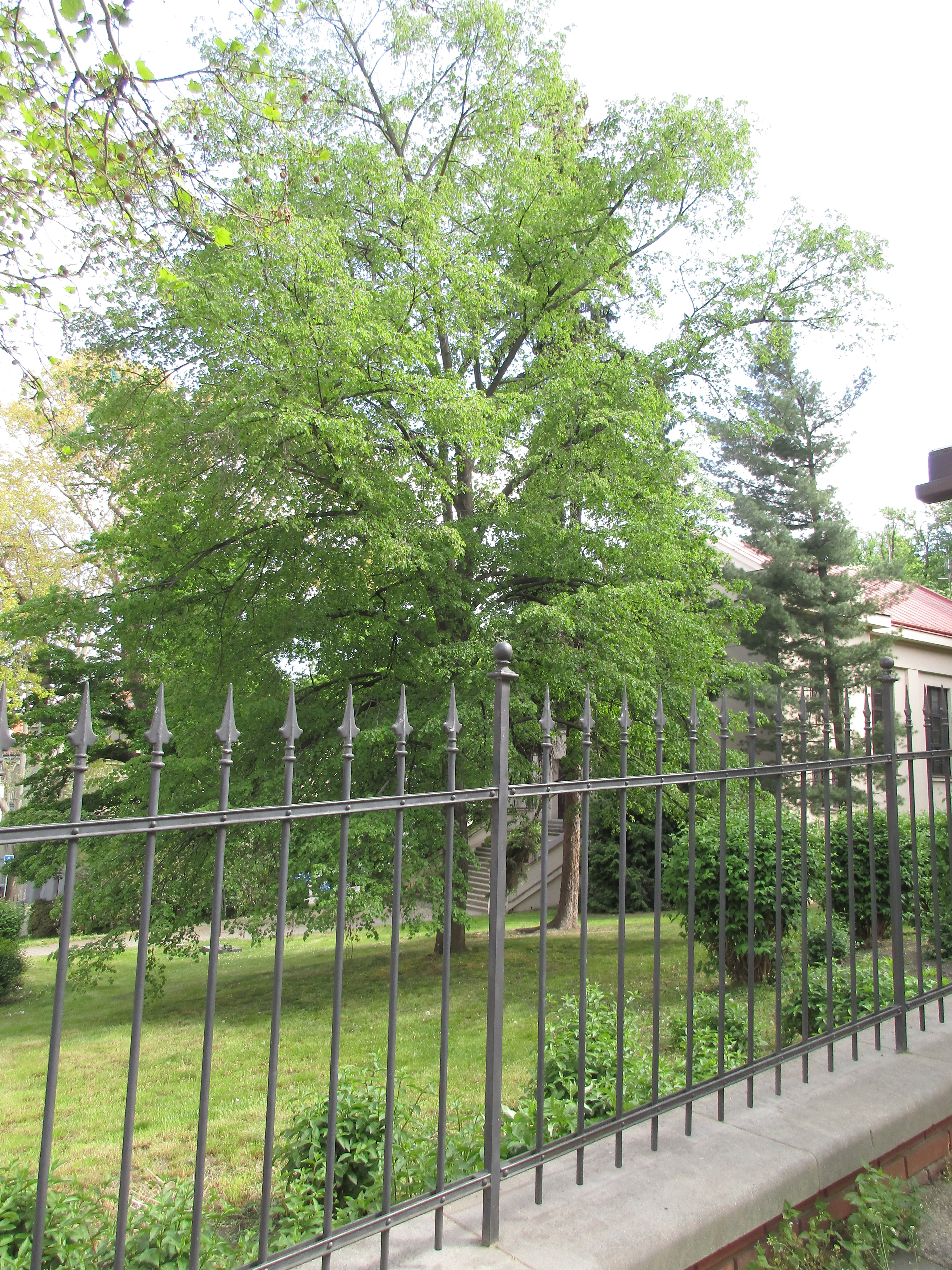 Lípa republiky. Praha 5 - Smíchov, ulice U Santošky. Vysazena 28. října 1968 na památku 50. výročí vzniku Československé republiky.